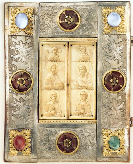 Abdinghofer